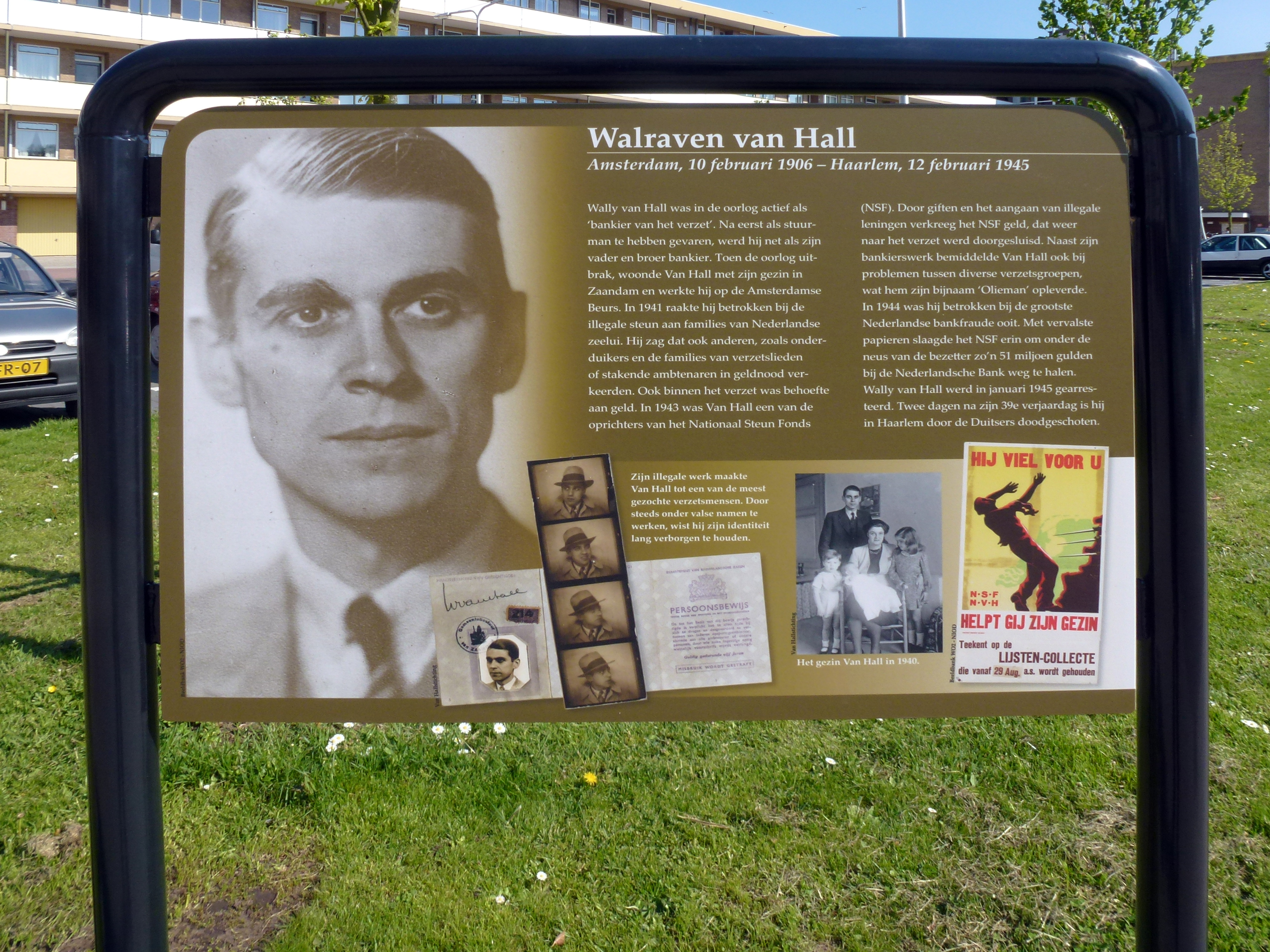 Verzetsheld Walraven van Hall. Op 10 april 2014 zijn in Oosterwei 10 van in totaal 16 borden met informatie over verzetsstrijders onthuld. In Oosterwei, een wijk in Gouda, zijn na de 2e wereldoorlog, de wederopbouw, 16 straten vernoemd naar verzetsstrijders. Veel bewoners van deze straten wisten maar weinig over de verzetshelden waarnaar de straten vernoemd zijn. Zij en anderen hebben er voor gezorgd dat nu in iedere straat een informatiebord staat, zodat de gedachtenis aan deze strijders levend blijft. (De overige 6 borden zijn in april 2018 geplaatst))